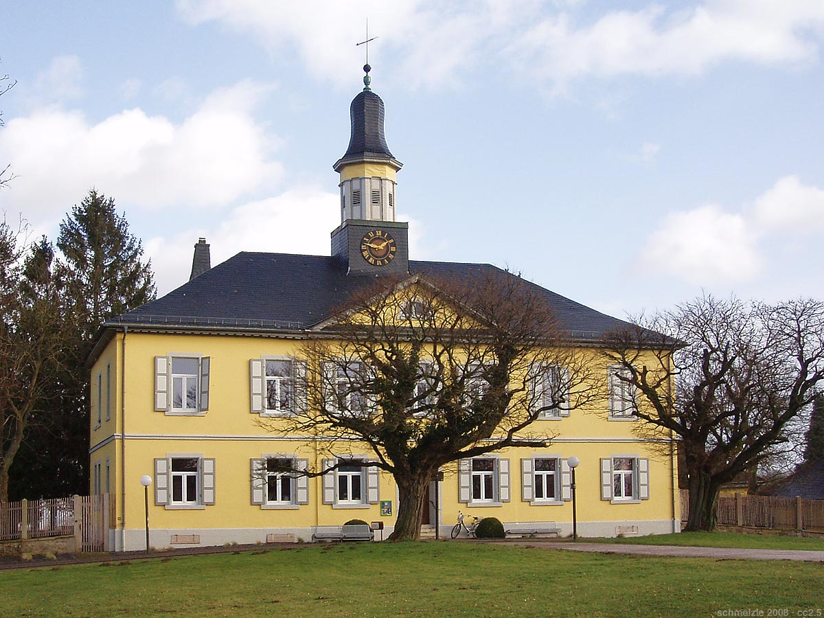 Salinenamtsgebäude in Bad Rappenau